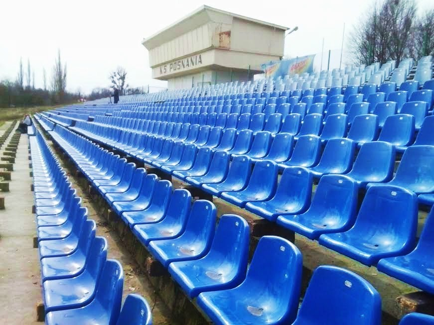 Stadion Posnanii w Poznaniu na ul. Słowiańskiej.